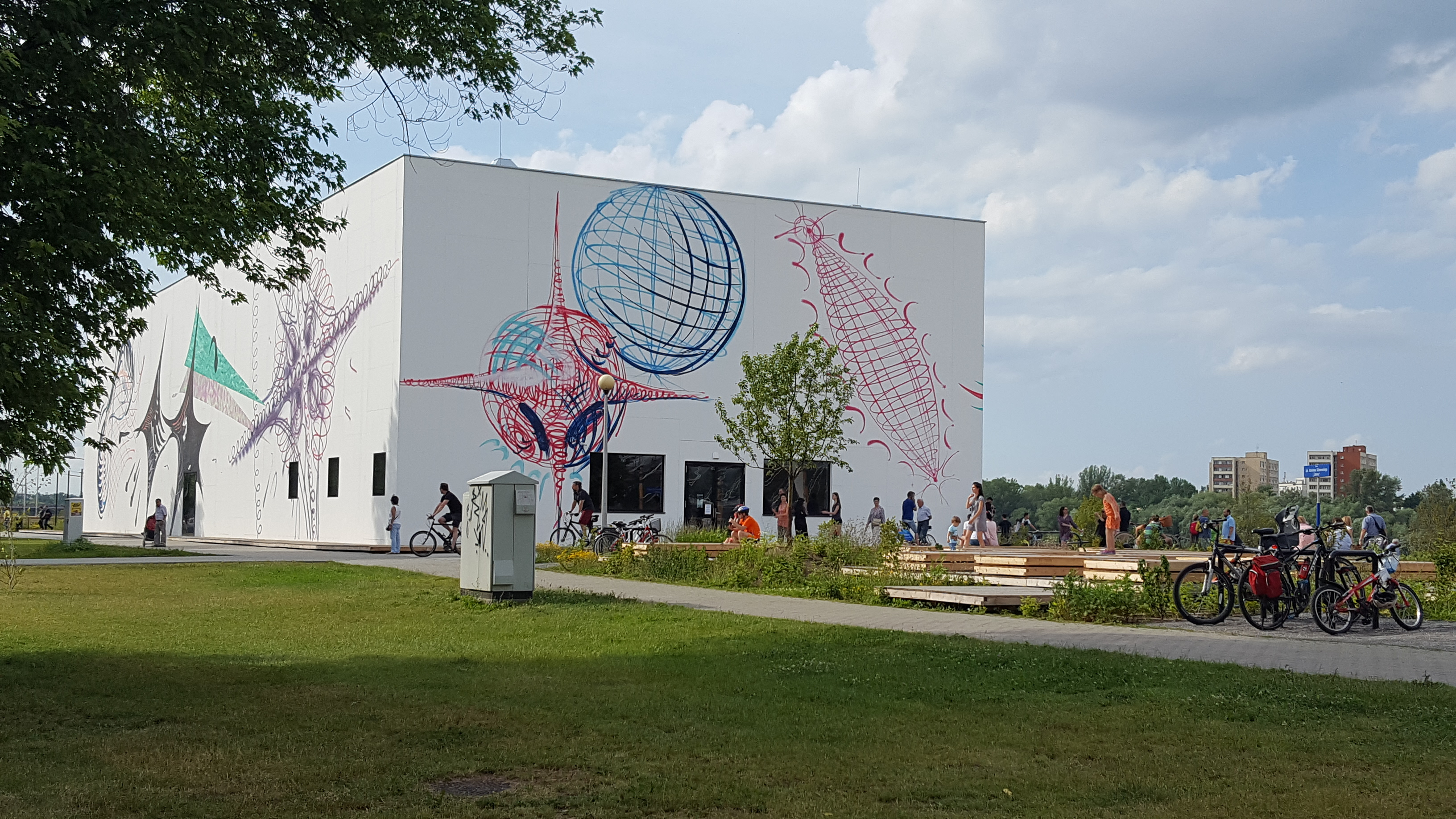 Siedziba Muzeum Sztuki Nowoczesnej w Warszawie przy Bukareszcie bulwarach wiślanych.